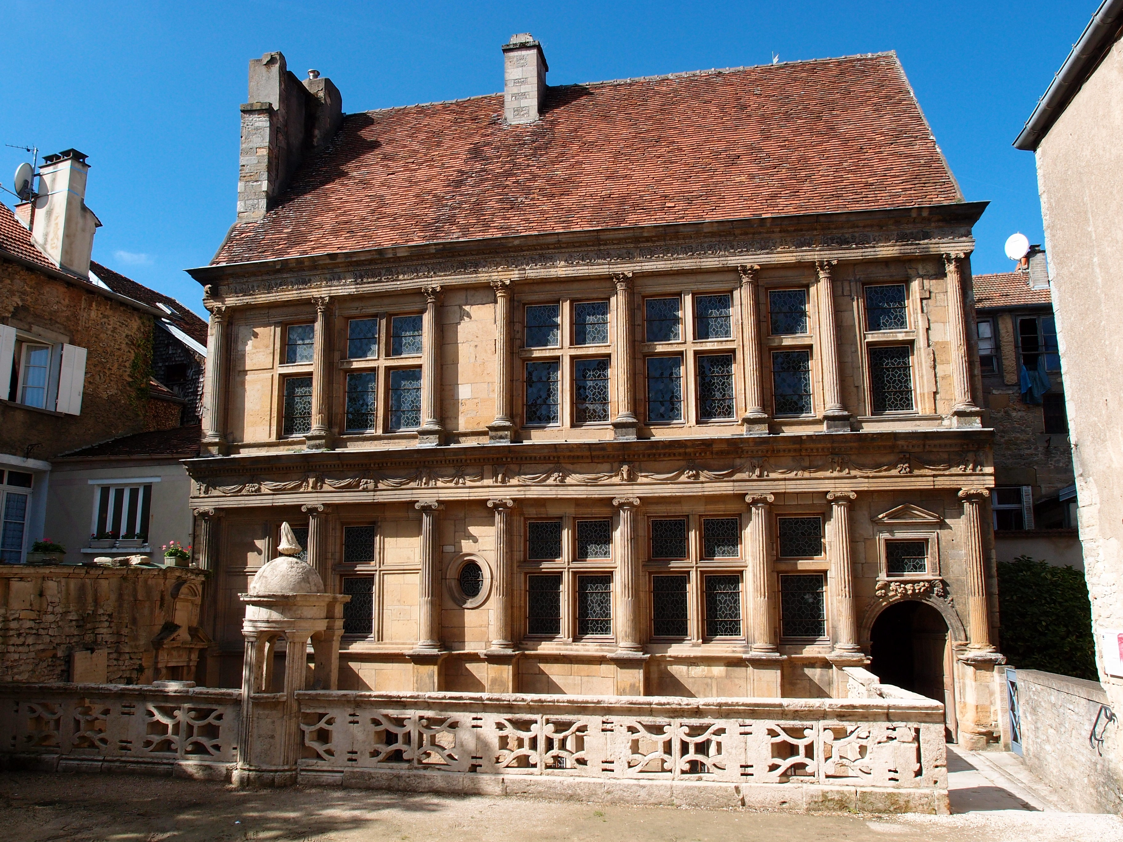 Maison Renaissance, Langres (Frankreich) Datum: 22.09.2013 Urheber: M. Pfeiffer alias Benutzer:Gordito1869 Quelle: privates Fotoarchiv des Urhebers